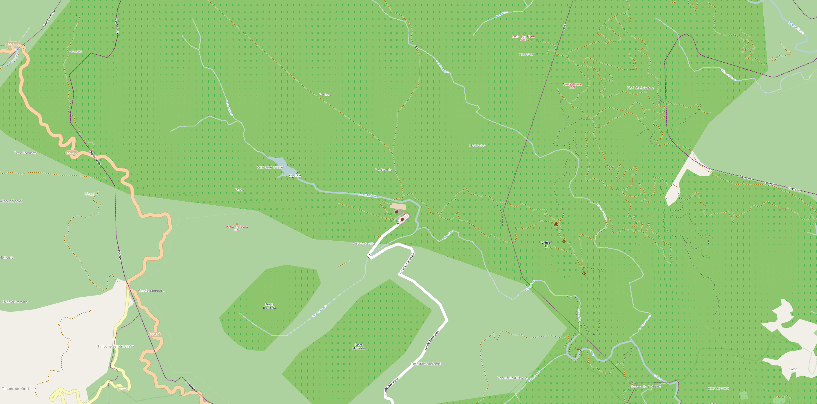 Stilo Ferdinandea osm 01 gen 2013